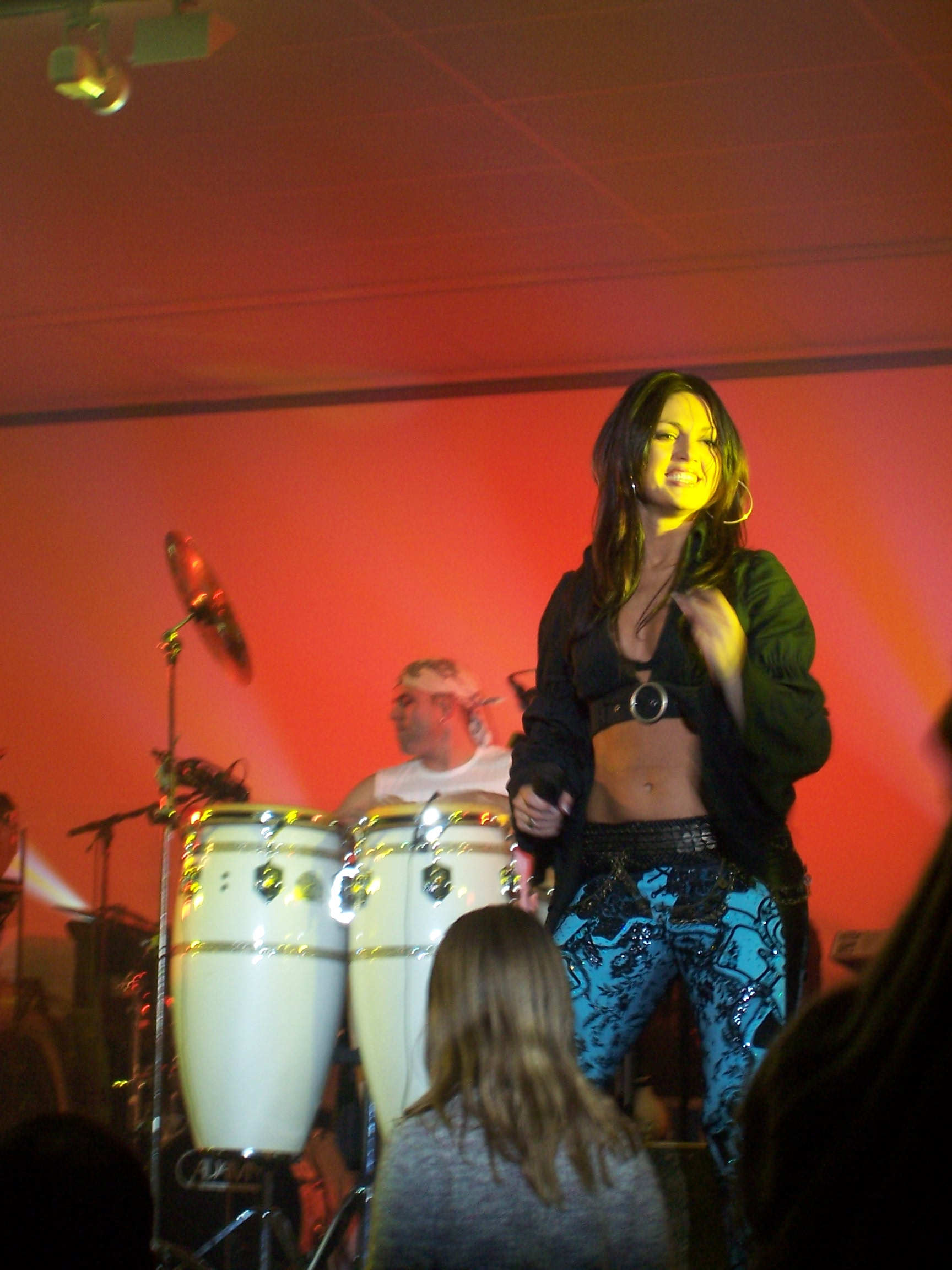 Belle Perez live 2006, Best-of-Tournee, Belgien